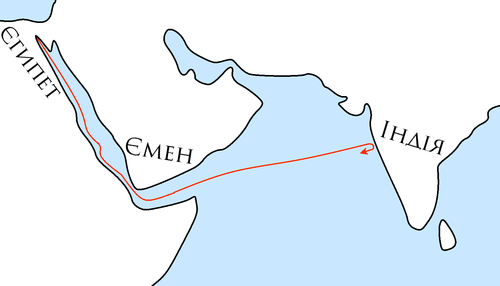 Подорож Евдокса Кизицького